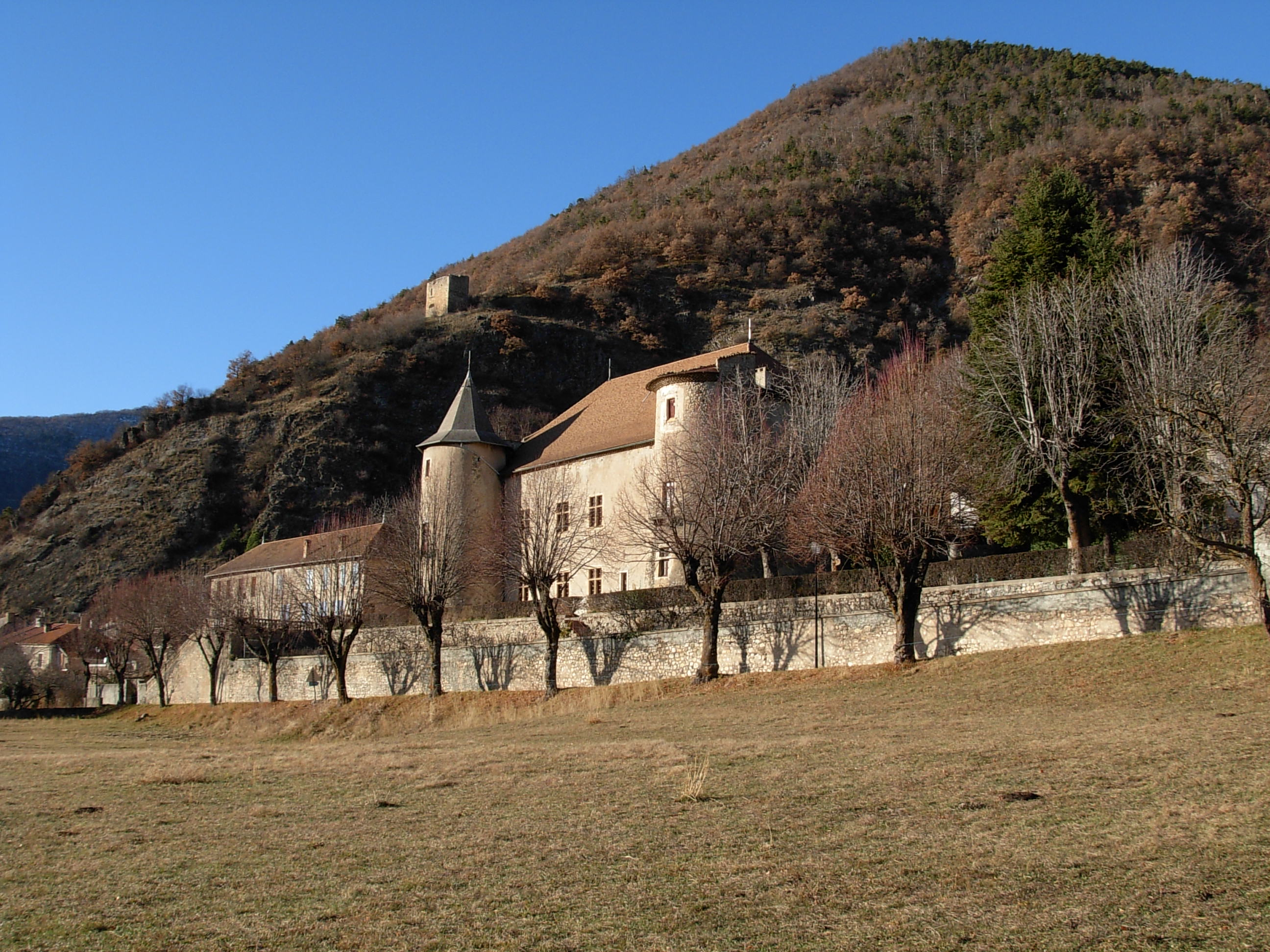 Le château de Montmaur et sur la colline la tour sarrasine